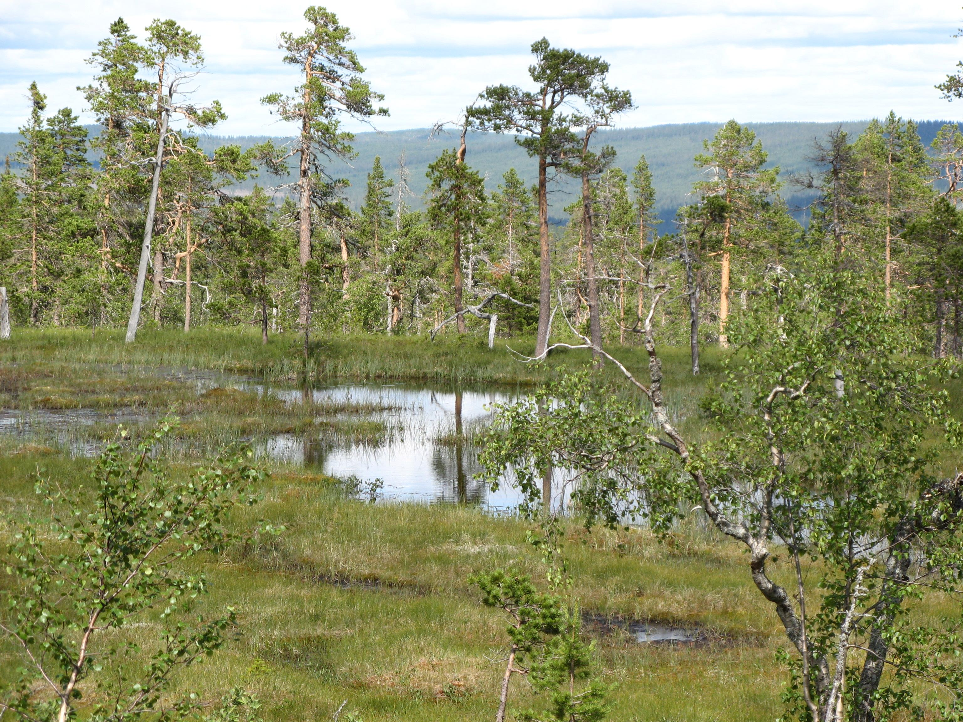 Swamp in Fulufjällets Nationalpark